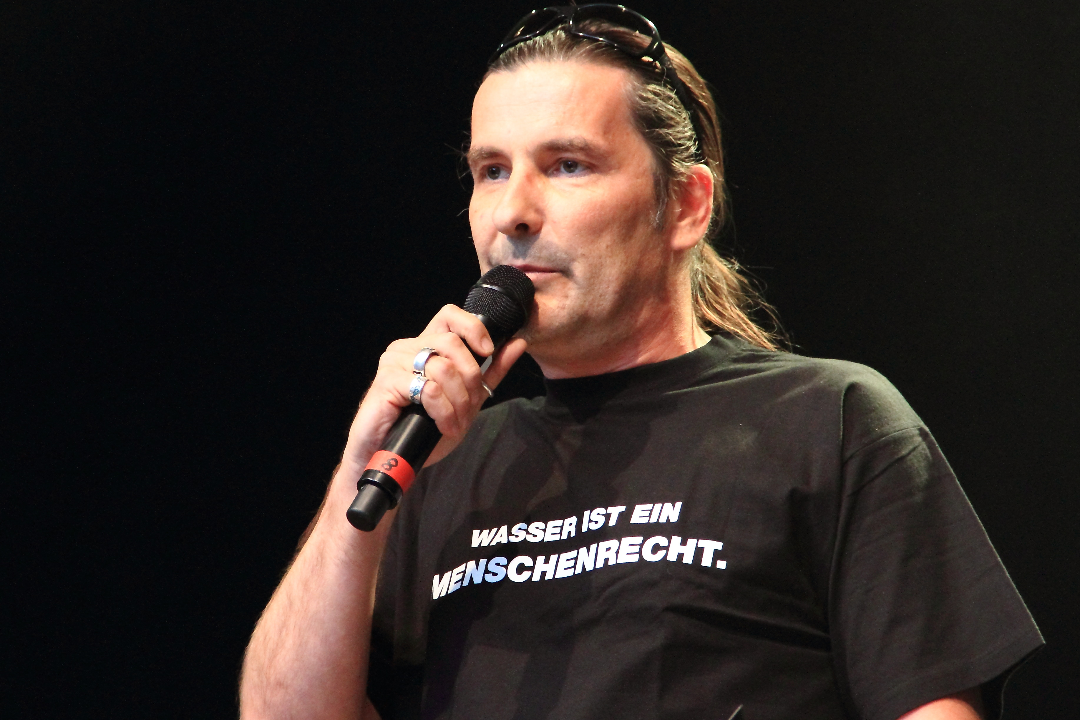 Der deutsche Journalist Arno Köster als Moderator auf der Großen Bühne im Heinepark auf dem TFF Rudolstadt 2014.